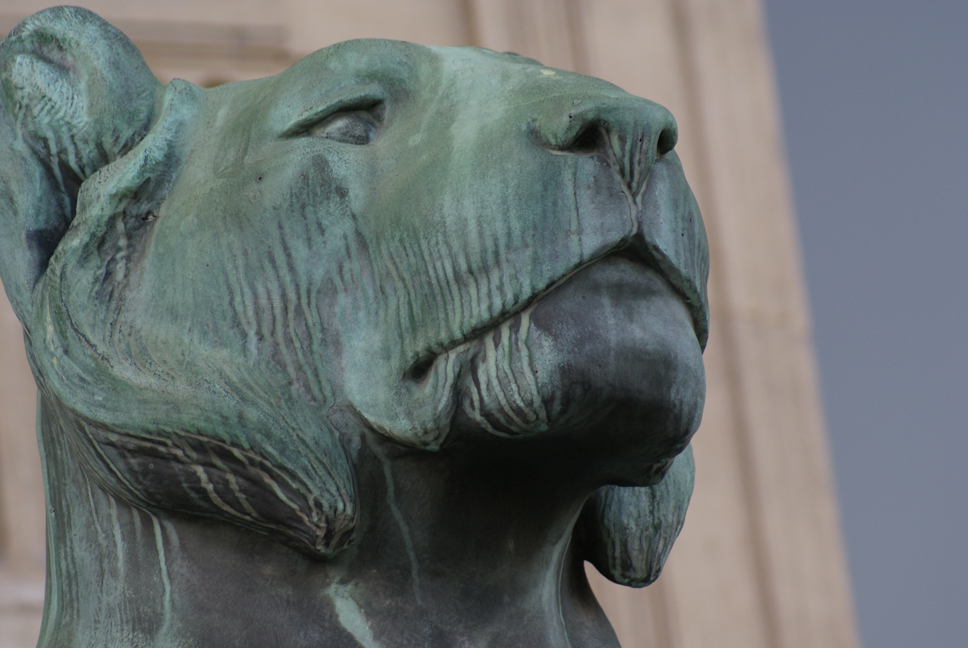 Lionne en bronze, par Auguste Cain, flanquant l'entrée de l’École du Louvre